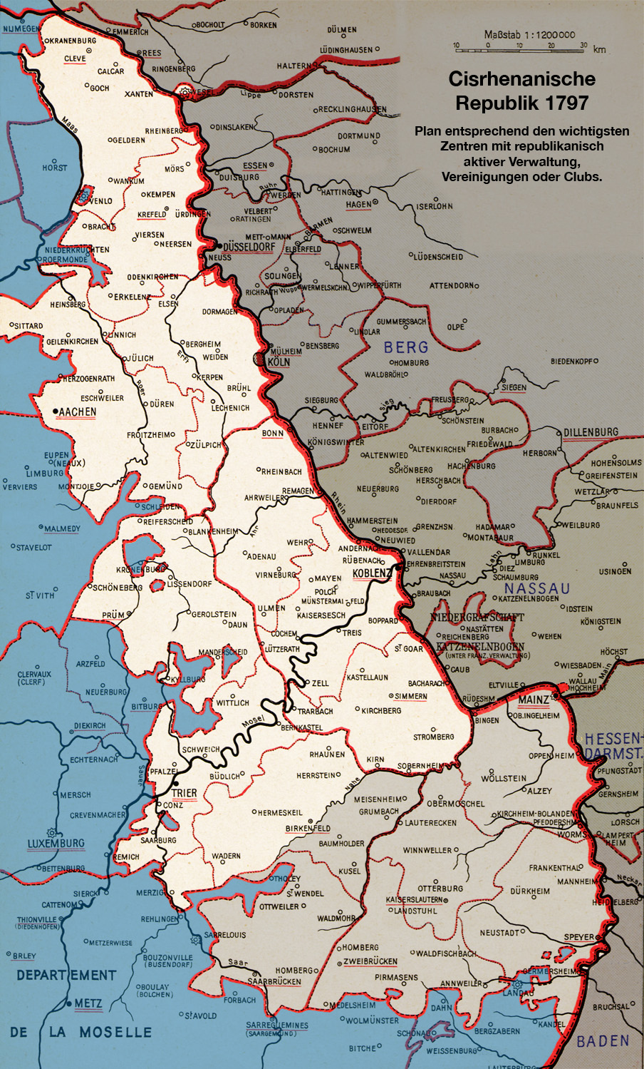 Angenommene Landkarte der linksrheinischen, "Cisrhenanischen Republik", wie sie 1797 entsprechend den örtlich unterschiedlich starken Aktivitäten für eine unabhängige Republik hätte gegründet werden können.